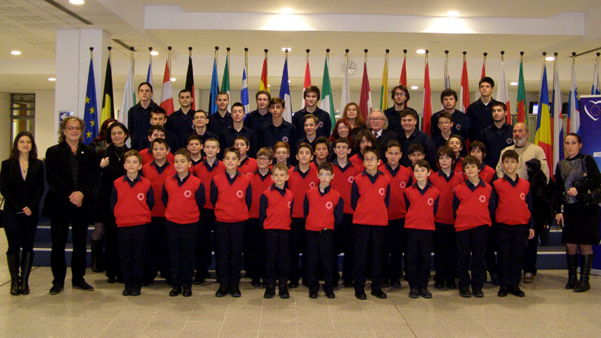 Белгия, 2014